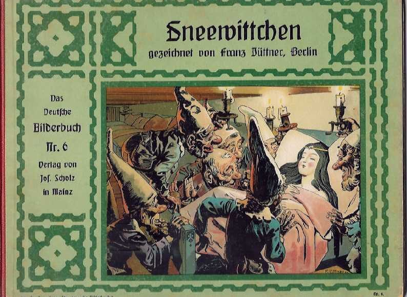 Franz Jüttner: Sneewittchen, Verlag Josef Scholz Mainz, ca 1910, Großquer 8° - Das Deutsche Bilderbuch Nr. 6 - , 15 Seiten mit 7 farbig lithographierten ganzseitigen Abbildungen sowie den Texten mit kleinen einfarbigen Abbildungen, farbig illustriertes Titelblatt, Originalhalbleinen mit farbigen Deckelbild und Deckeltitel